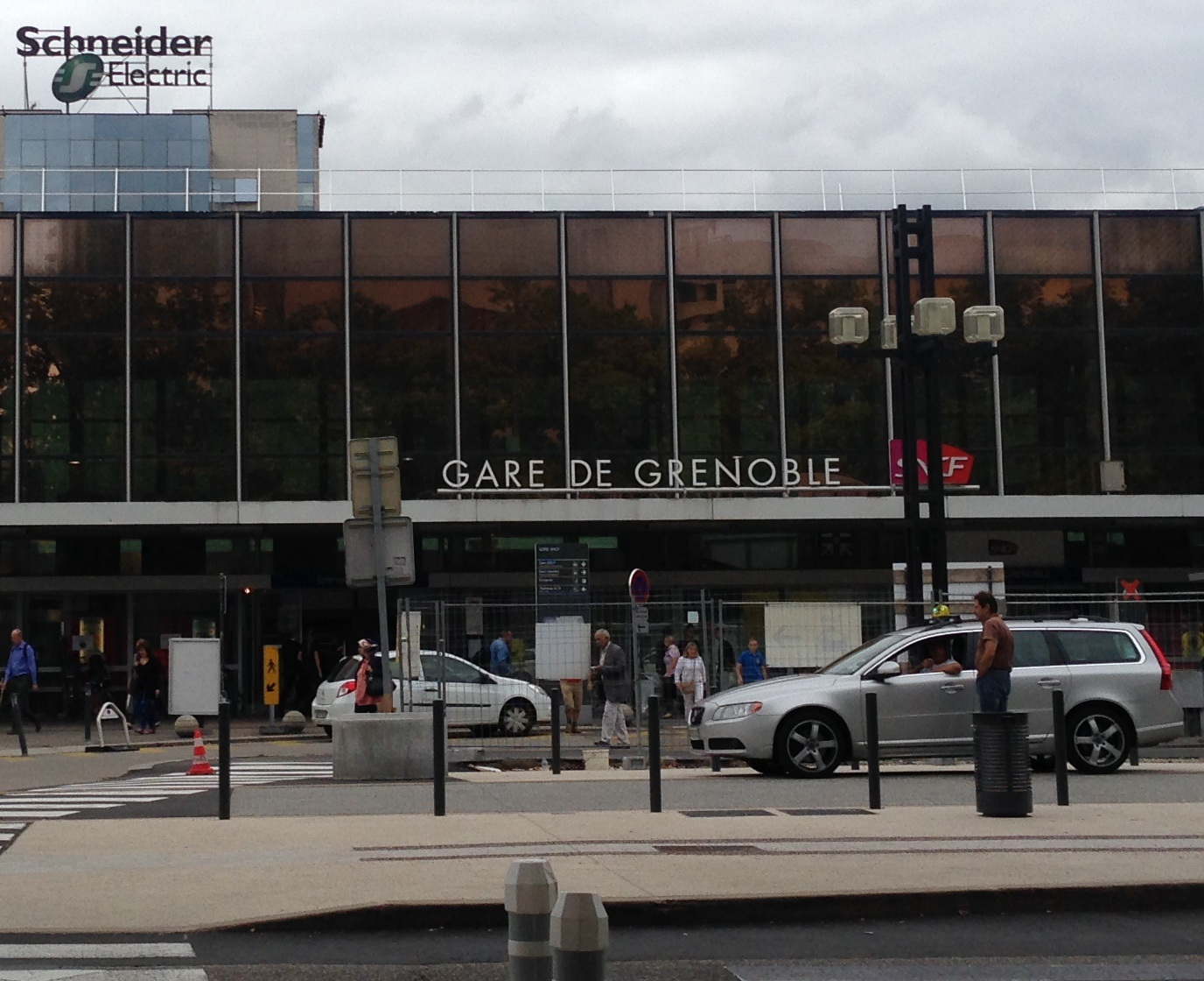 格勒诺布尔站（Gare de Grenoble）